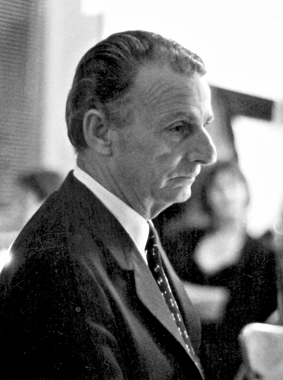 Antonio Todaro, Berlin Grunewald, 1988